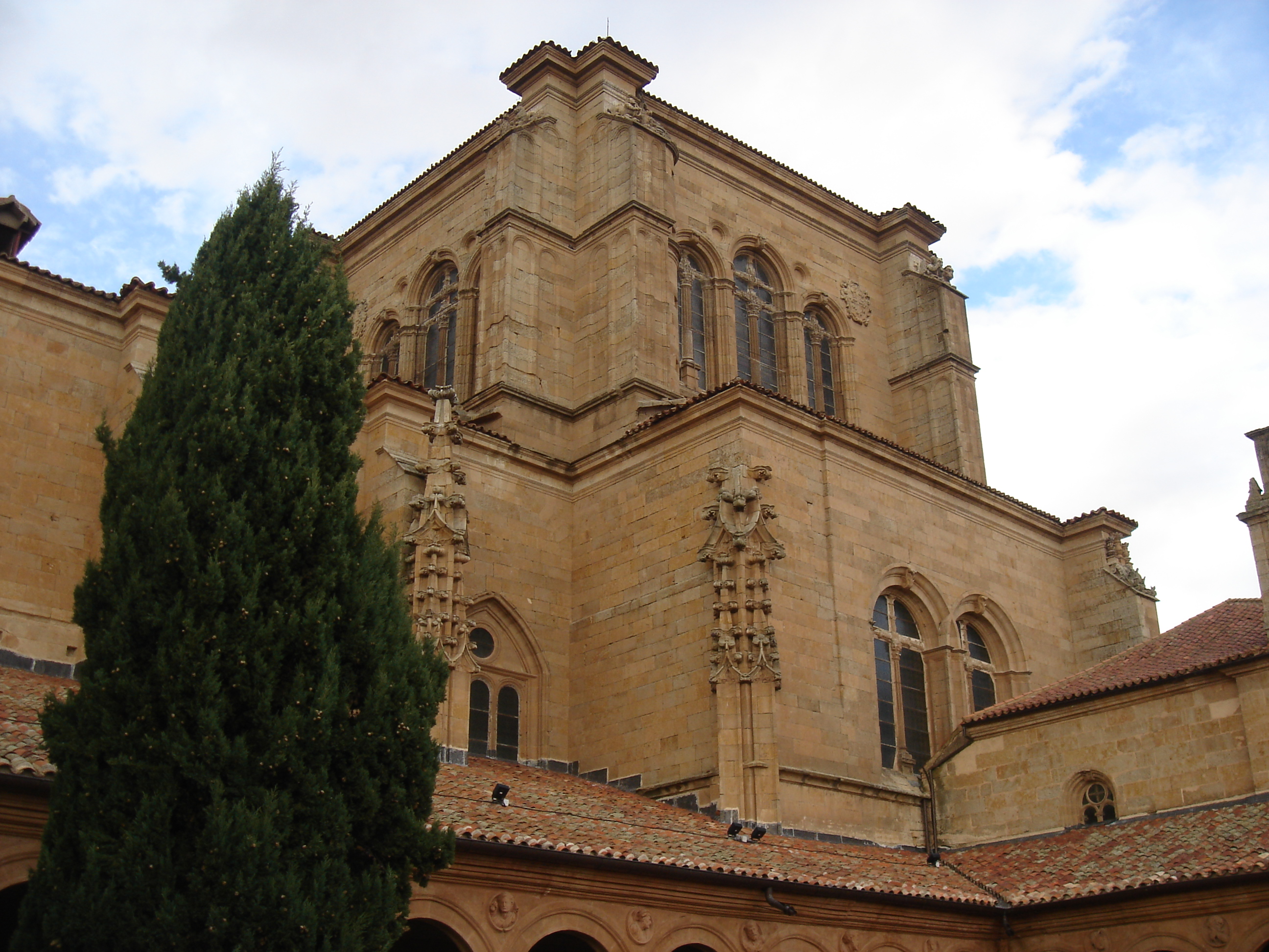 Photo of San Esteban in Salamanca